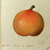 Beurré de Ghélin, d'après Alphonse Mas.